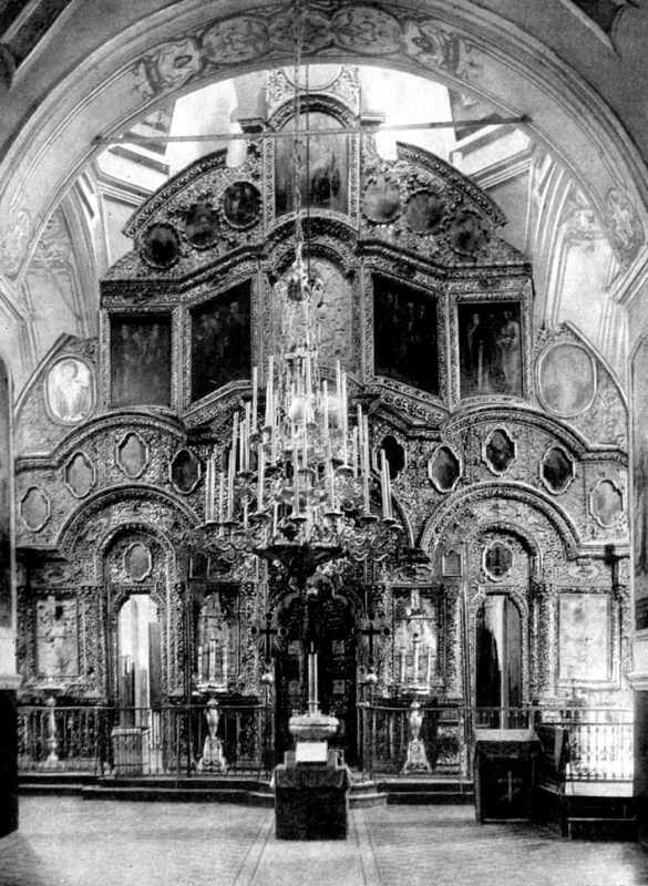 Іконостас Спасо-Пребраженського собору в Ізюмі. Створений 1765 року, знищений у 1929-1931 роках.